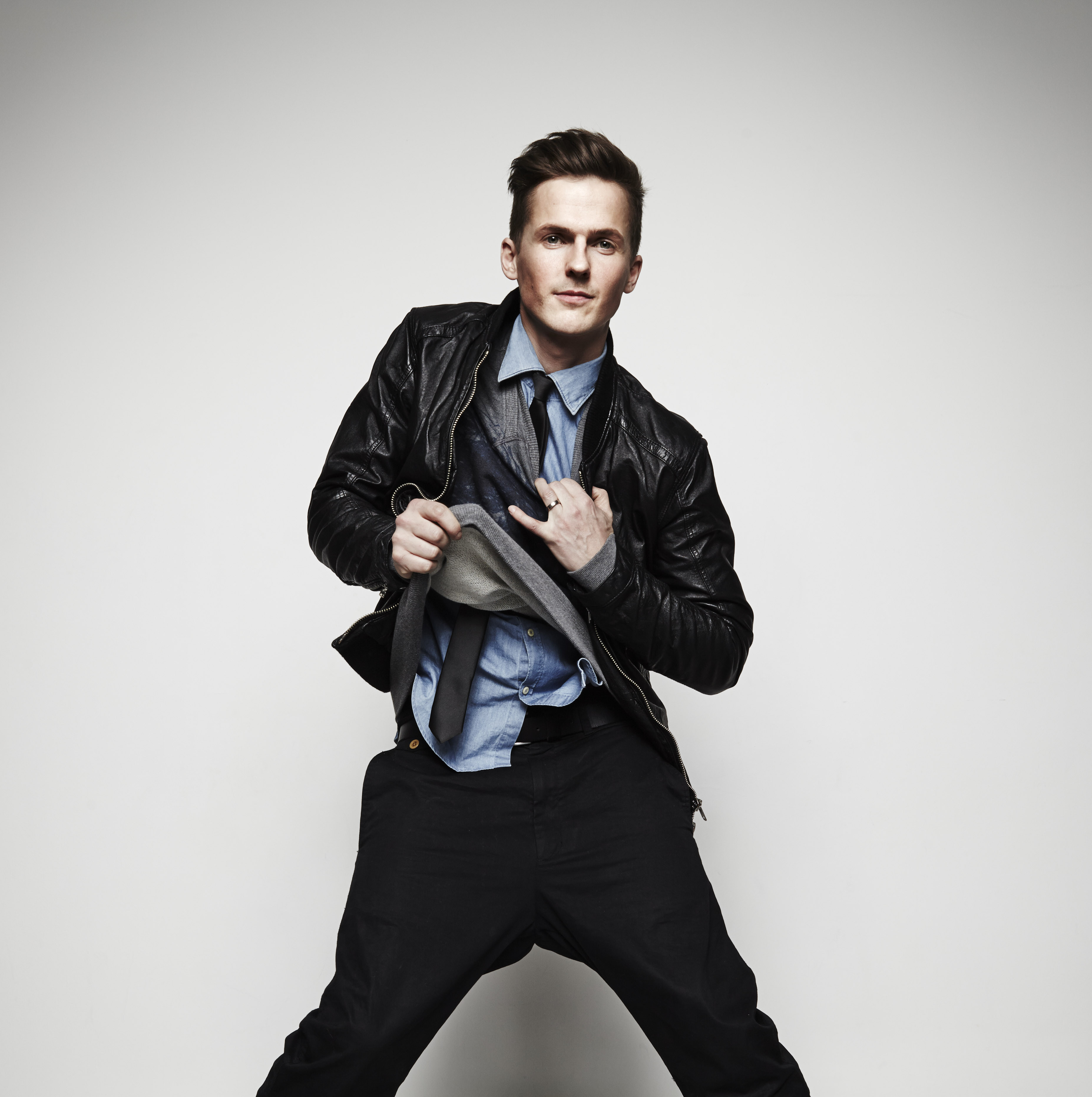 Artisten David Lindgren.